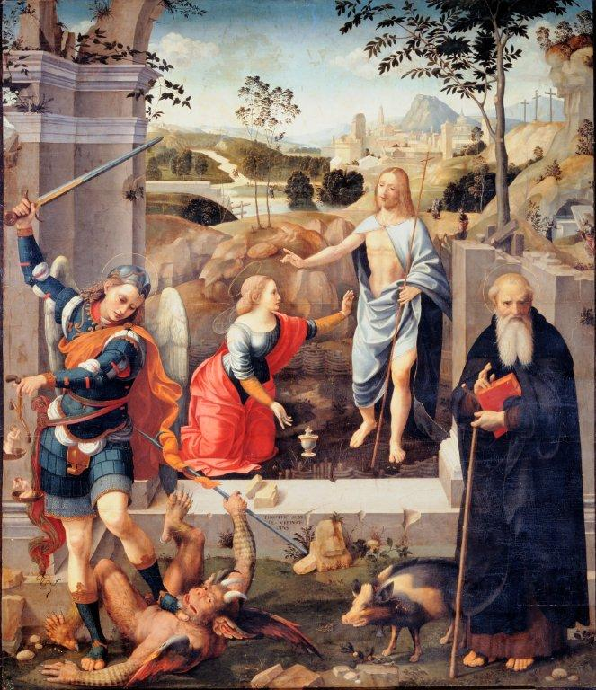 retable